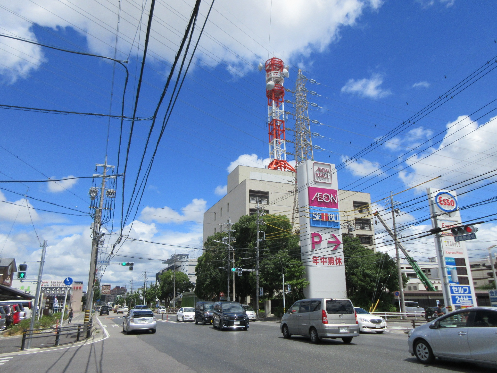 中部電力岡崎営業所（岡崎市戸崎町）